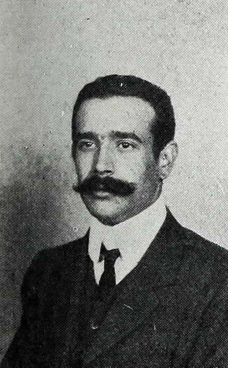 Inocencio Medina Vera.